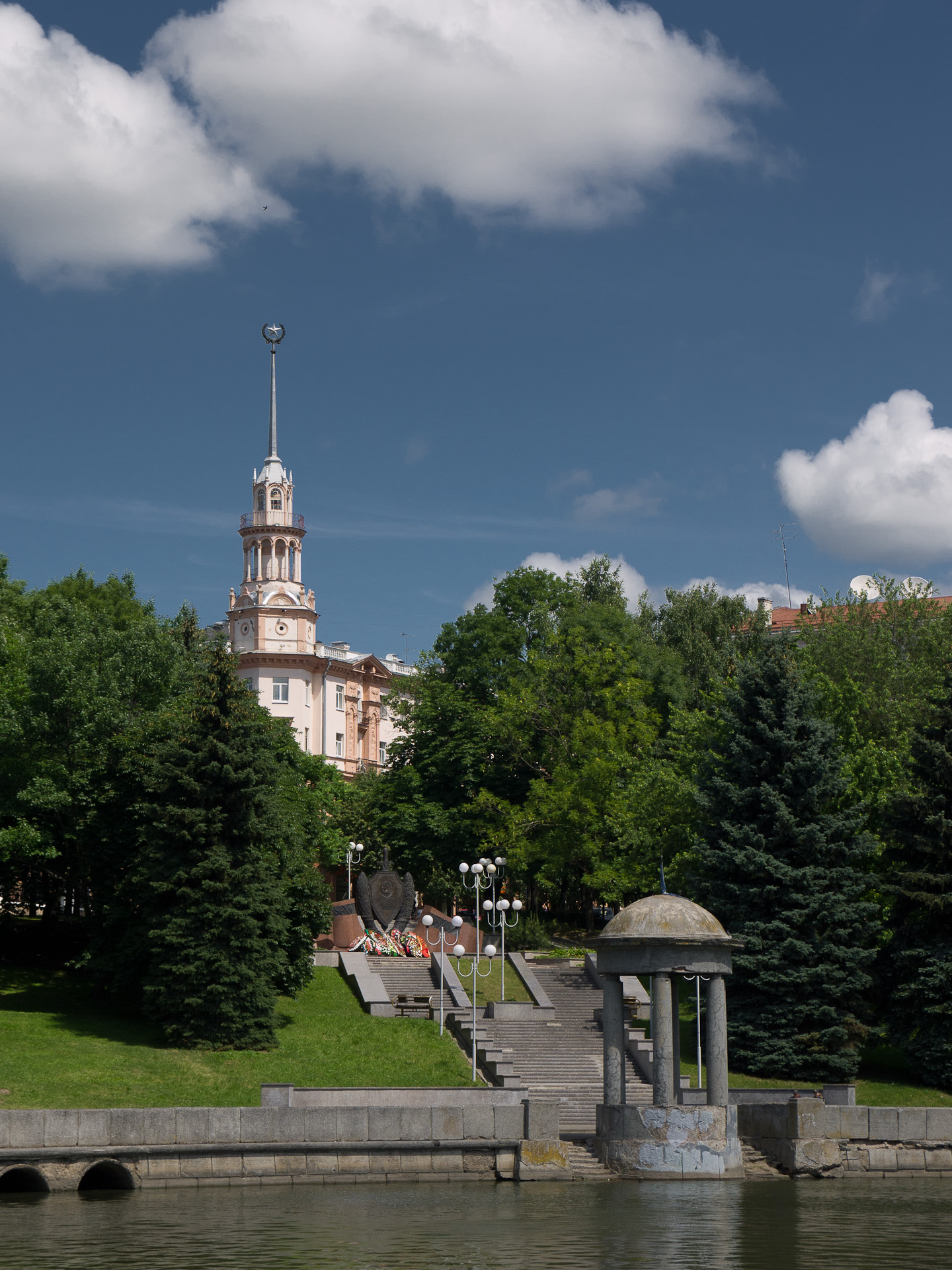 Janka Kupala Park